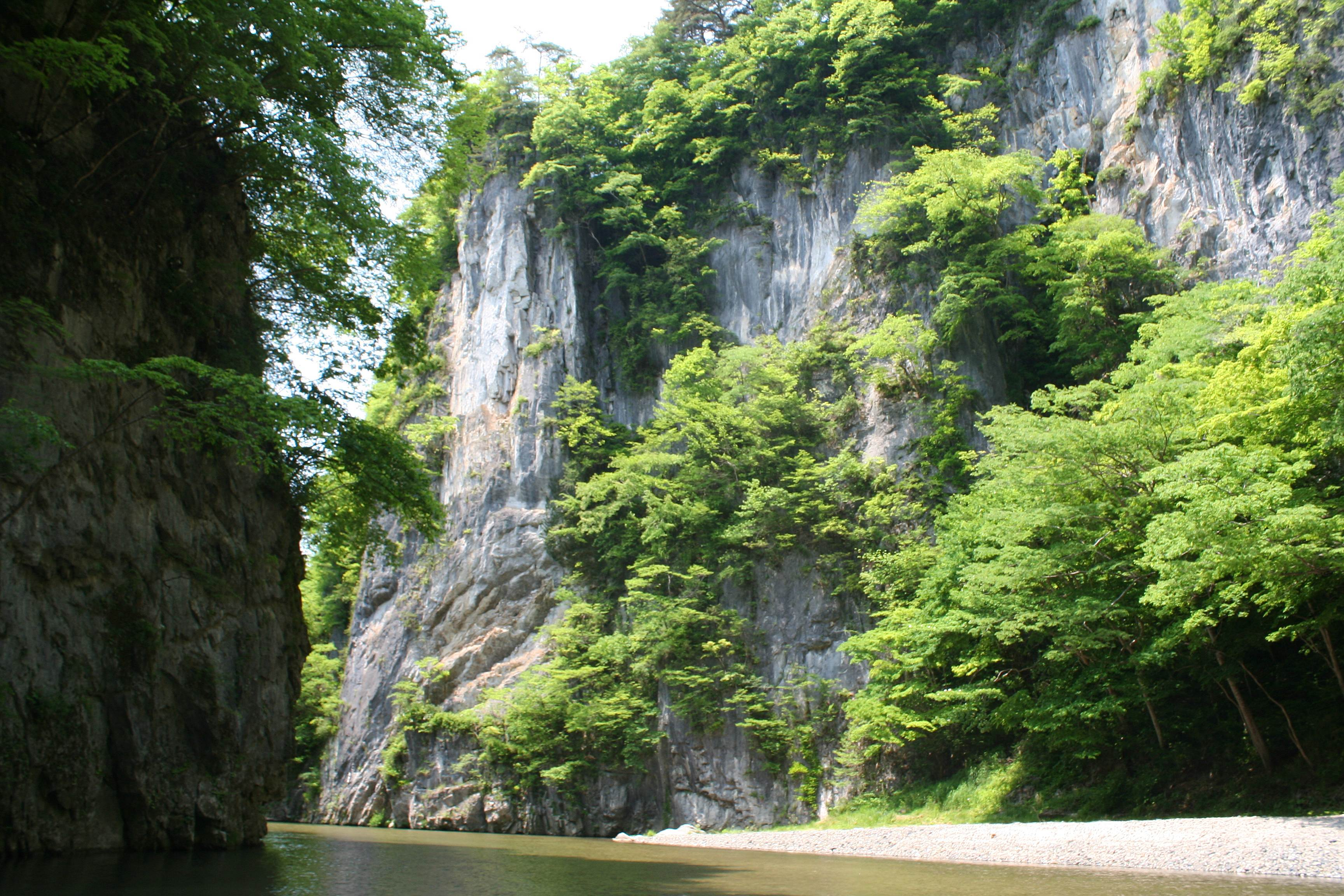 猊鼻渓Geibi-kei